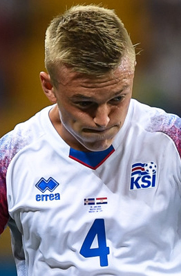 Сборная Исландии уступает Хорватии и покидает ЧМ-2018